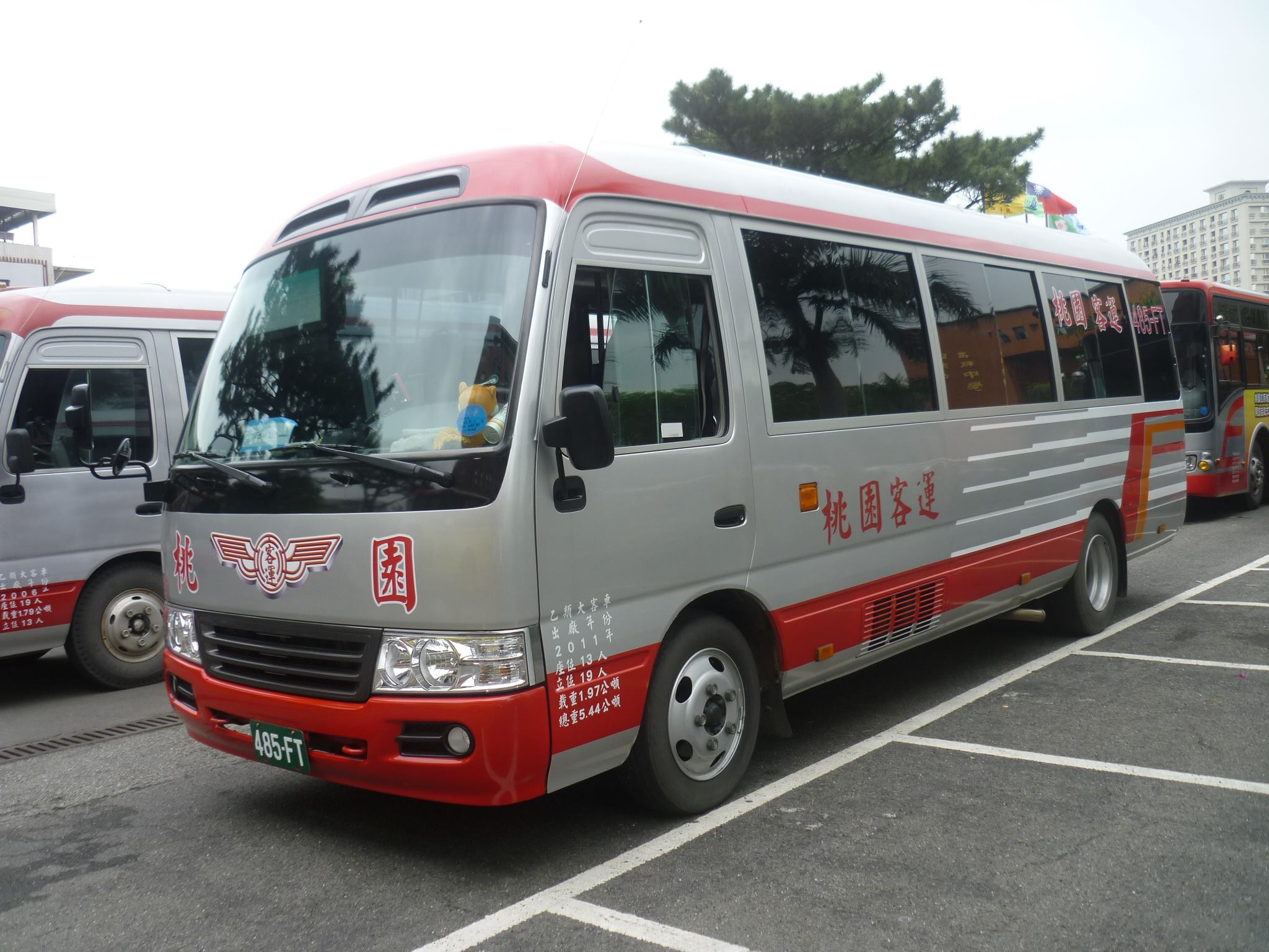 桃園客運豐田中巴多用於偏遠路線